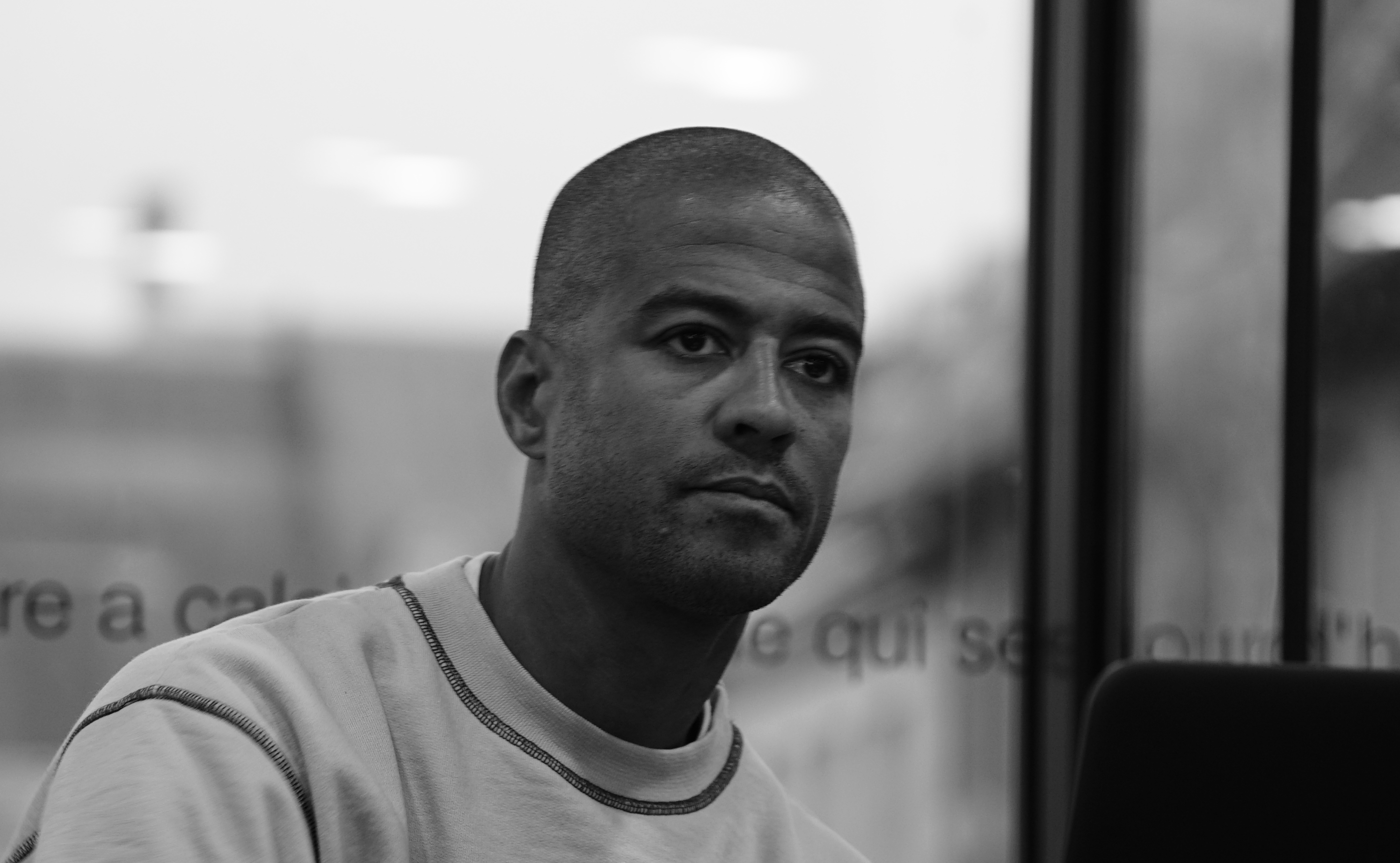 conférence en la médiathèque Falala.